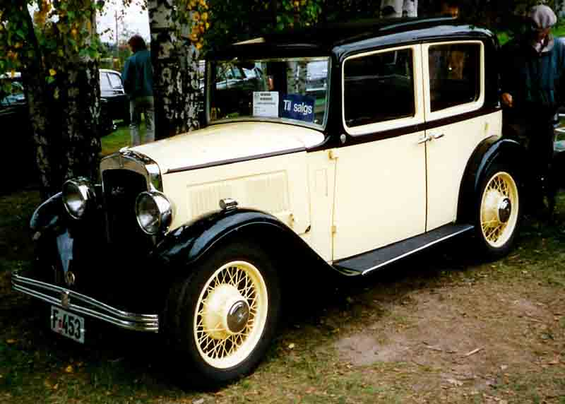 Austin 4-Door Saloon